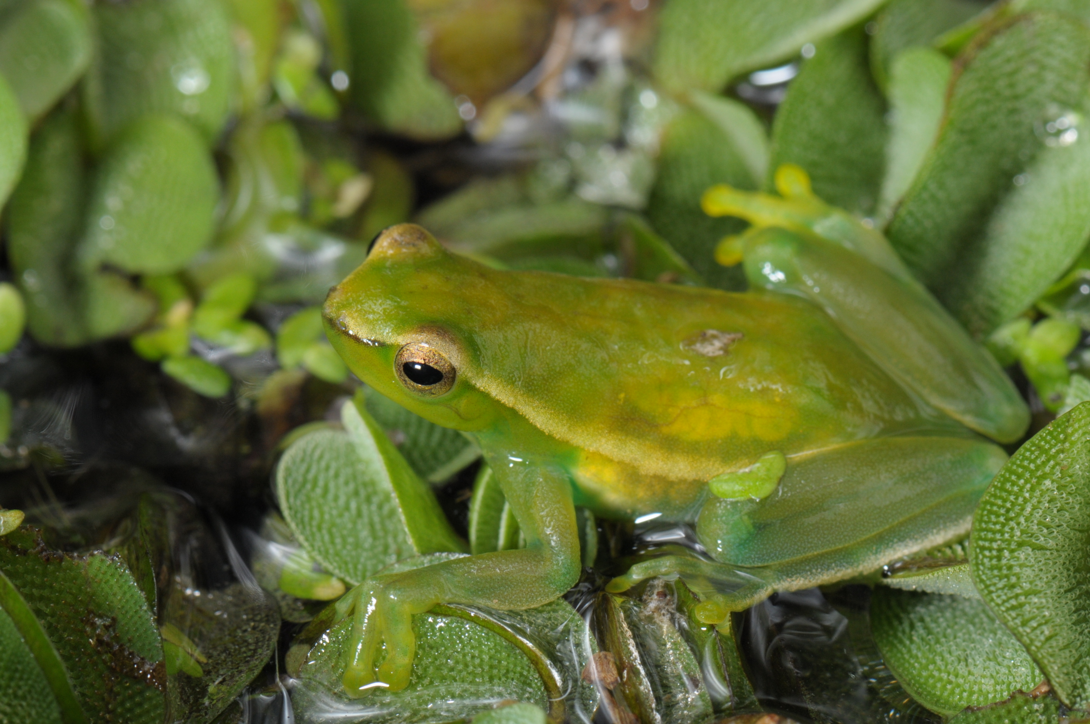 Perereca limão - Sphaenorhynchus orophilus - Espécie endêmica da Mata Atlântica.